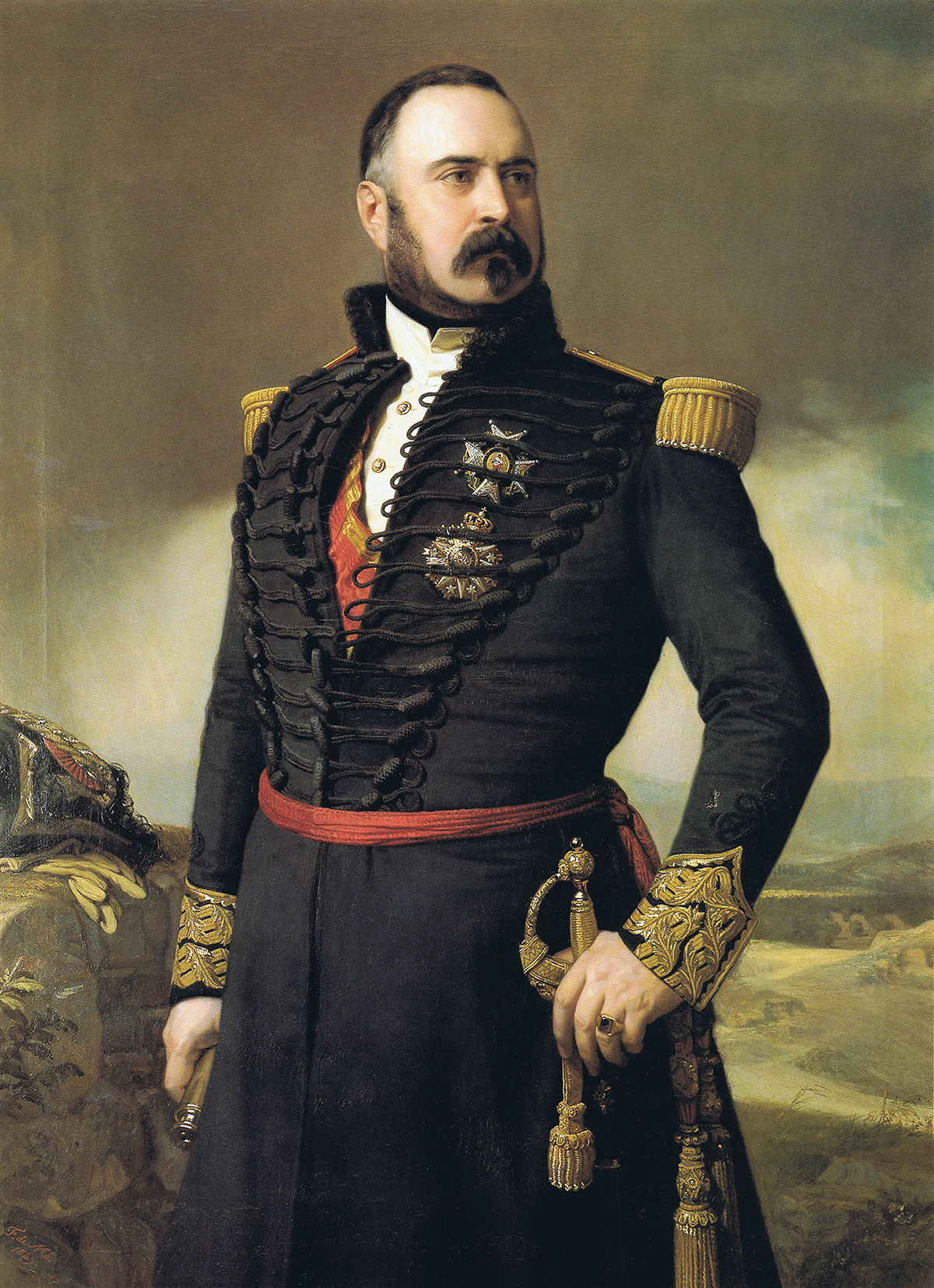 Retrato del militar y político español Manuel de Mazarredo (1807-1857). En la Biblioteca Nacional de España hay litografía de la pintura hecha por Pedro Barcala Sánchez y fechada en 1857 con la inscripción: «Exmo. Sr. Teniente General / D.N Manuel Mazarredo».